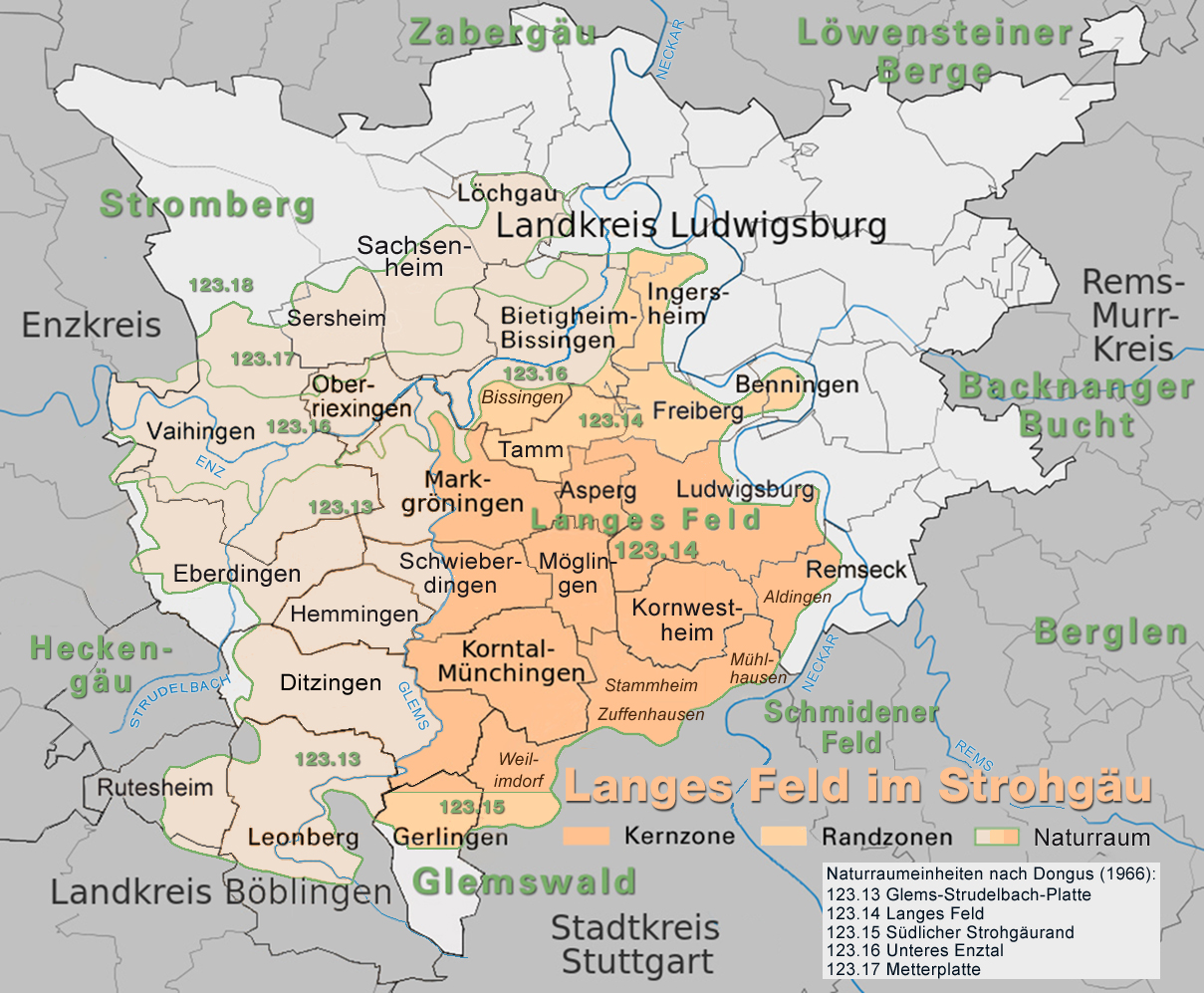 Langes Feld mit überlieferter Kernzone und Randbereichen gemäß der naturräumlichen Gliederung nach Dongus (1966)